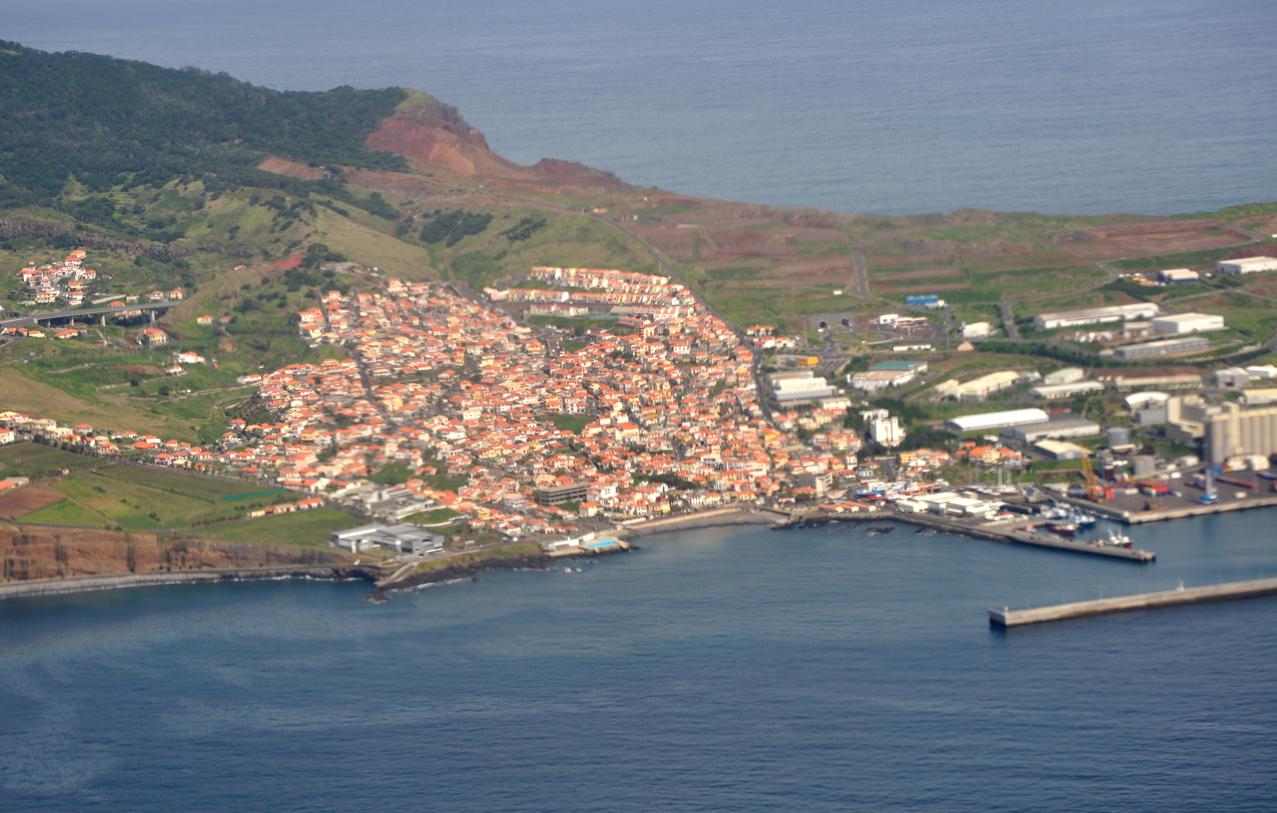 Portugal, Climbing out of Funchal across Ponta de São Lourenço